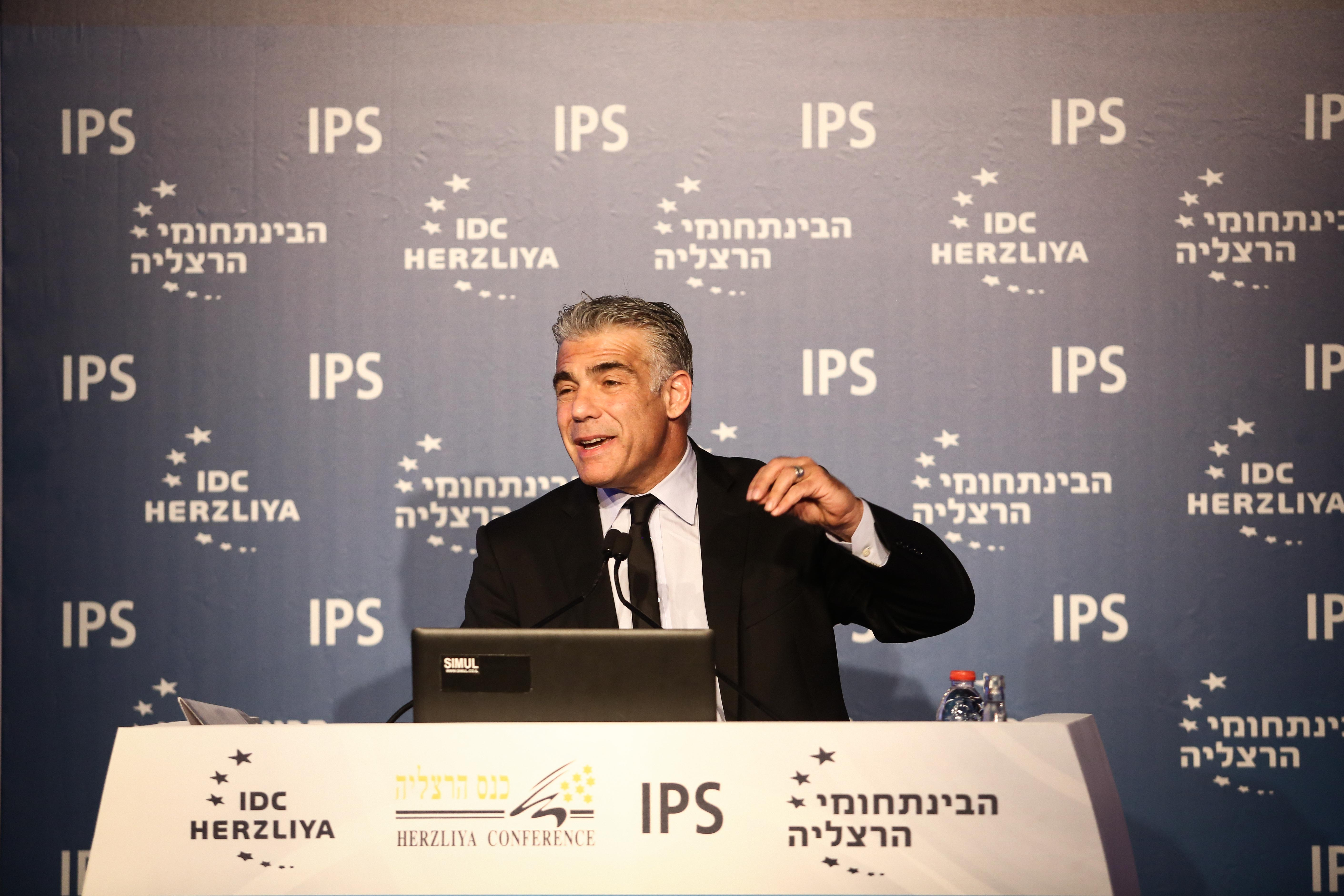 יאיר לפיד בכנס הרצליה 2016 של המכון למדיניות ואסטרטגיה במרכז הבינתחומי הרצליה